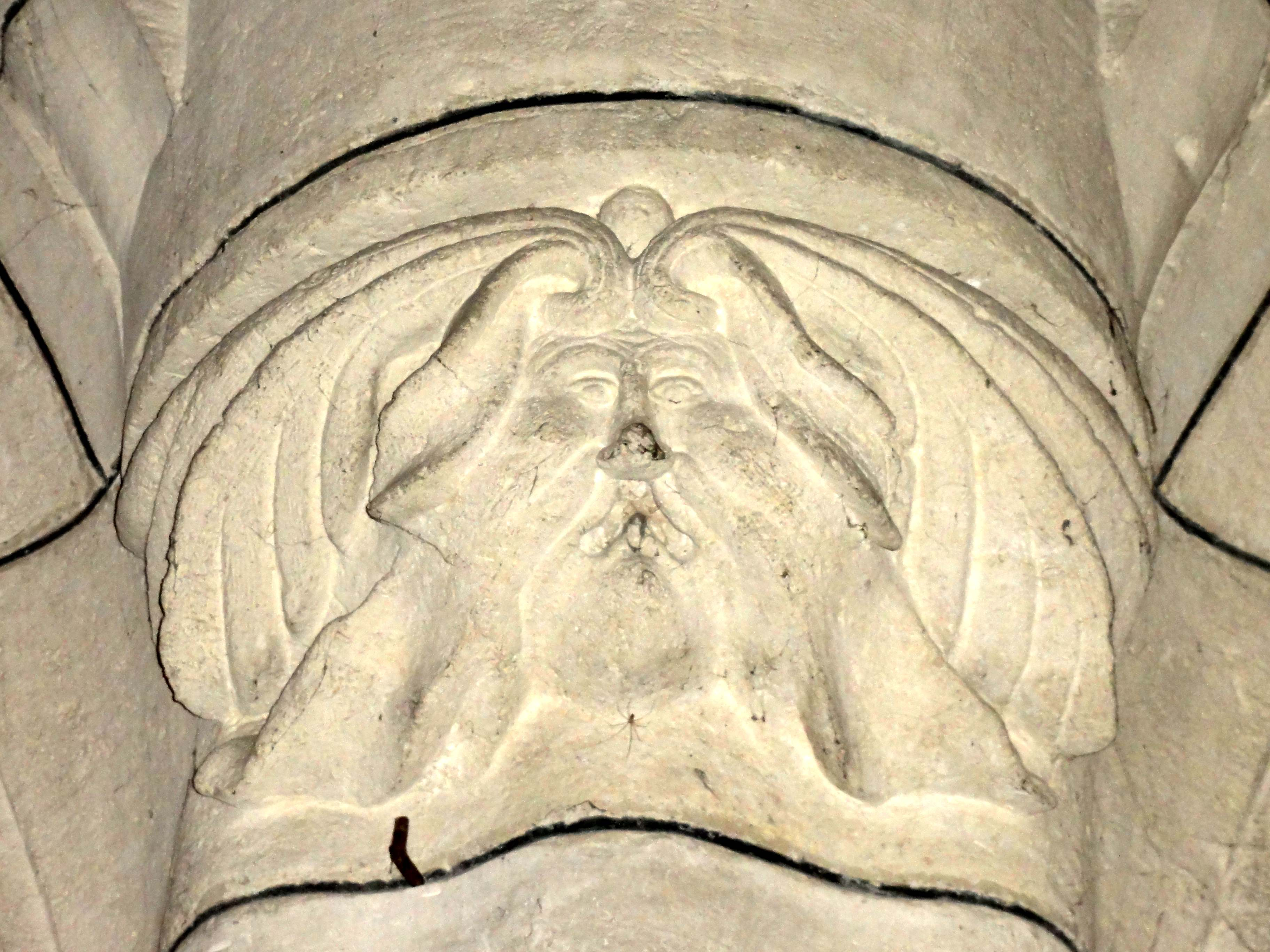 Cul-de-lampe de la nef.